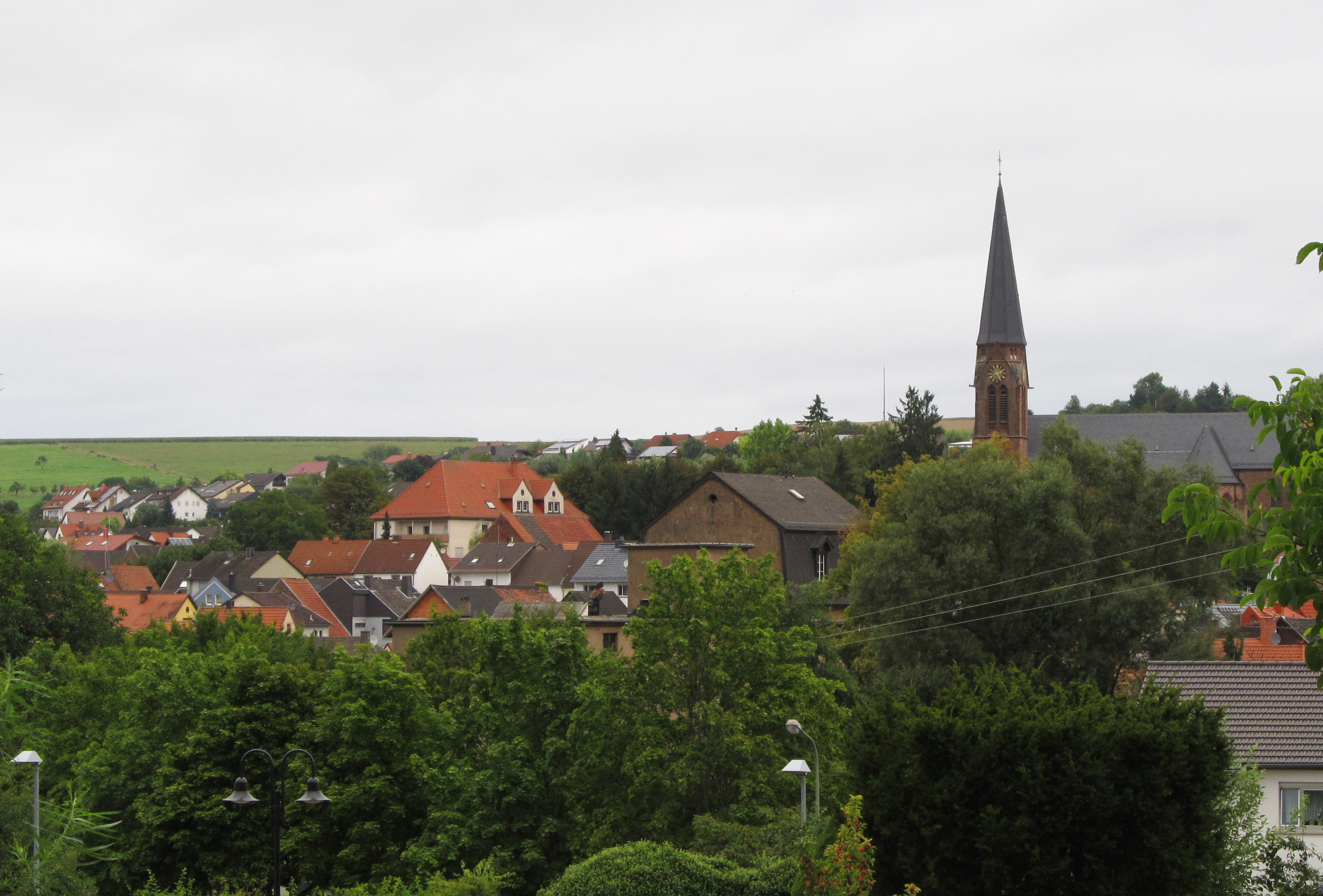 Blick auf Contwig, Kreis Südwestpfalz, Rheinland-Pfalz